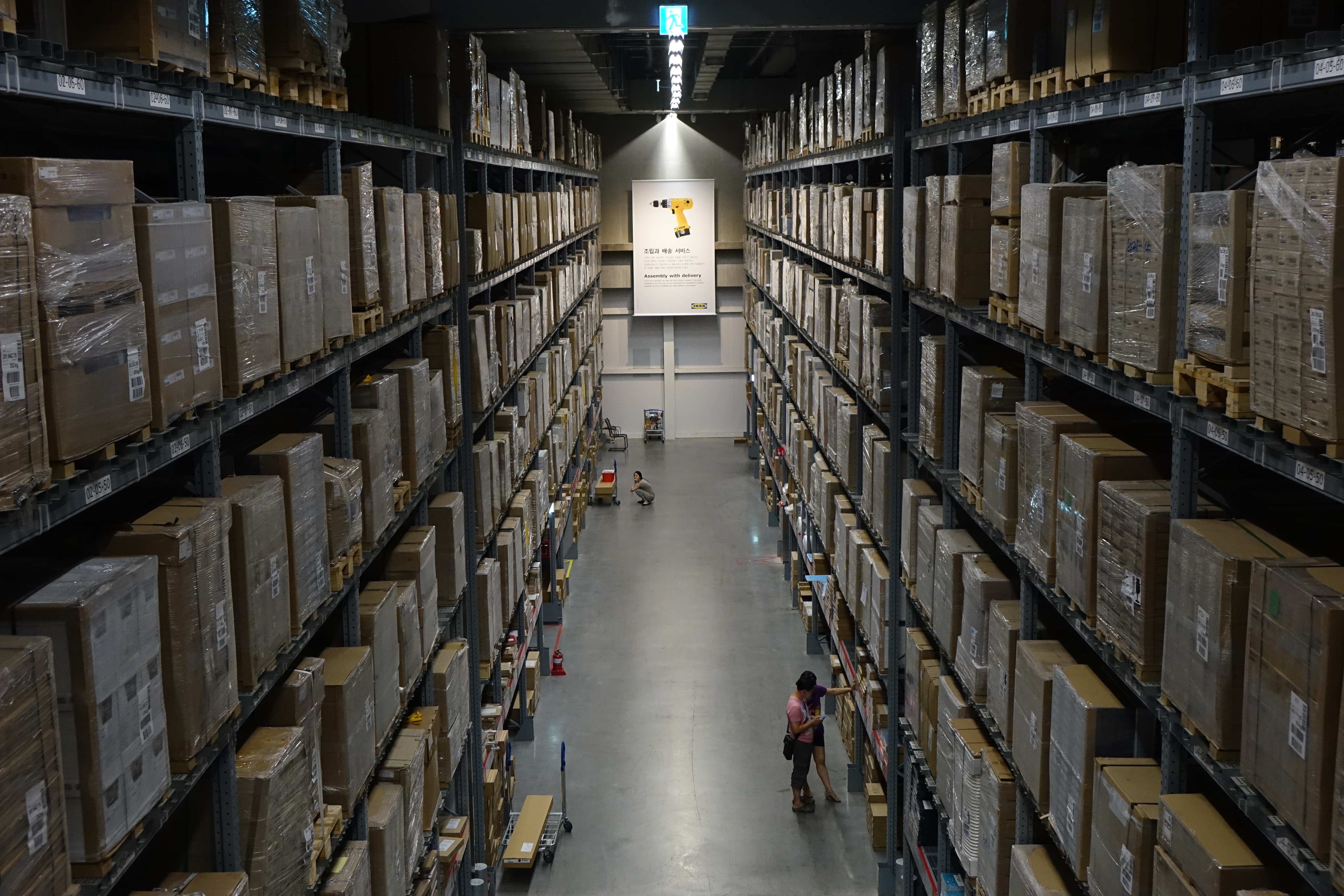 본인은 사진의 저작권자로서, 이 저작물을 'CC0 1.0 보편적 퍼블릭 도메인 기증' 저작권으로 배포합니다. 이에 따라, 본인은 법이 정한 범위 내에서 저작인접권을 포함해 저작권법에 따라 전세계적으로 해당 저작물에 대해 본인이 갖는 일체의 권리를 포기하였어요. 본인의 허락을 구하지 않아도 누구나 이 저작물을 상업적인 목적을 포함 모든 목적으로 복사, 수정, 배포, 실연하실 수 있어요. 단 사진에 사람이 있는 경우 사용 전에 해당 인물의 동의가 필요하며 이는 초상권 및 퍼블리시티권을 사진 속 인물이 보유하고 있기 때문입니다. 전문적인 편집을 위해 사용되는 원본 파일을 원하시는 분은 원본을 원하시는 파일의 이름을 보내주세요. 감사합니다. 2015년 7월 25일. 최광모.